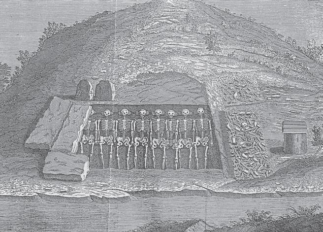 Planche représentative de la sépulture de Cocherel (Eure, France), publiée par Pierre Le Brasseur en 1722 dans son livre "histoire civile et ecclésiastique du comté d'Evreux".